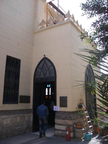 كنيس بن عزرا بمجمع الأديان بالقاهرة